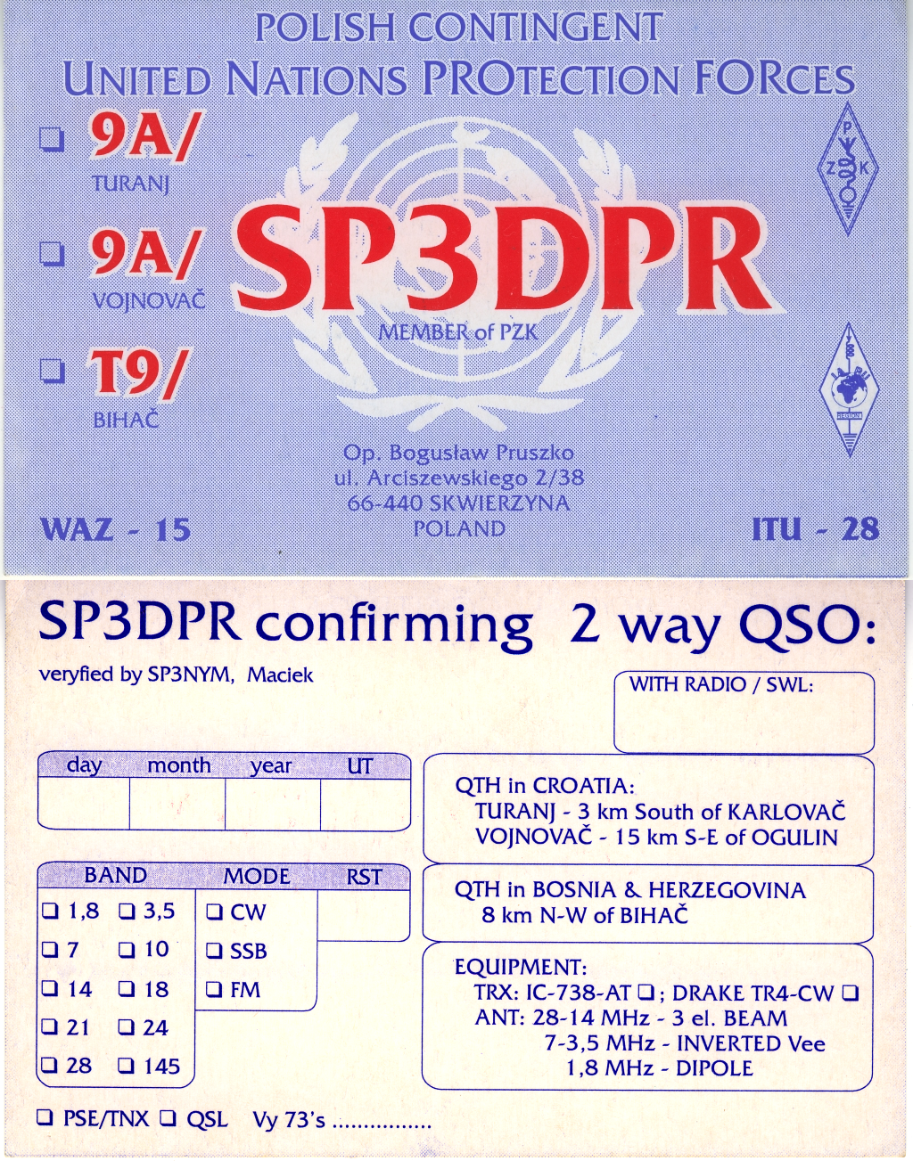 Karta QSL Bogusława SP3DPR podczas misji pokojowej ONZ w byłej Jugosławi